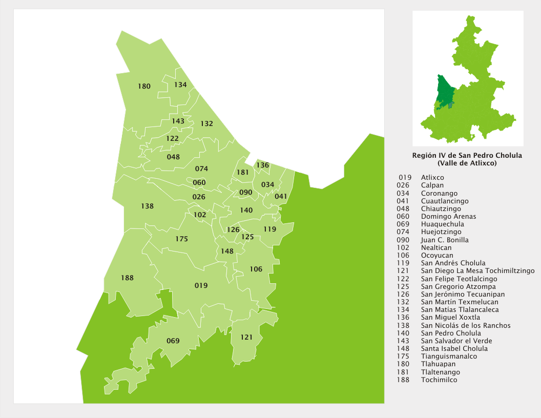 Mapa de la región de Cholula, Puebla, México